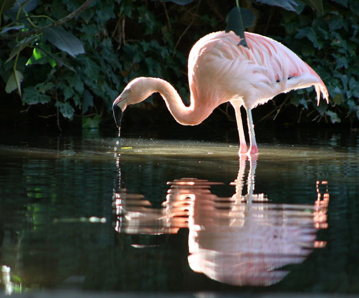 Flamant rose du Chili (Phoenicopterus chilensis)